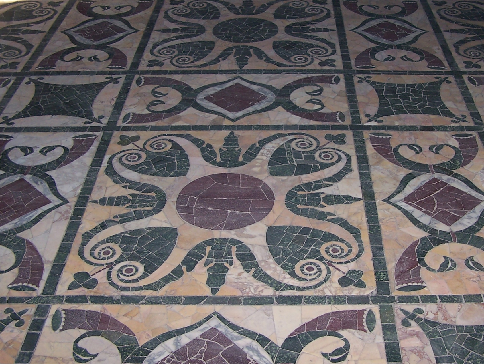 Forum Romanum, Boden der Curia Iulia (opus sectile).